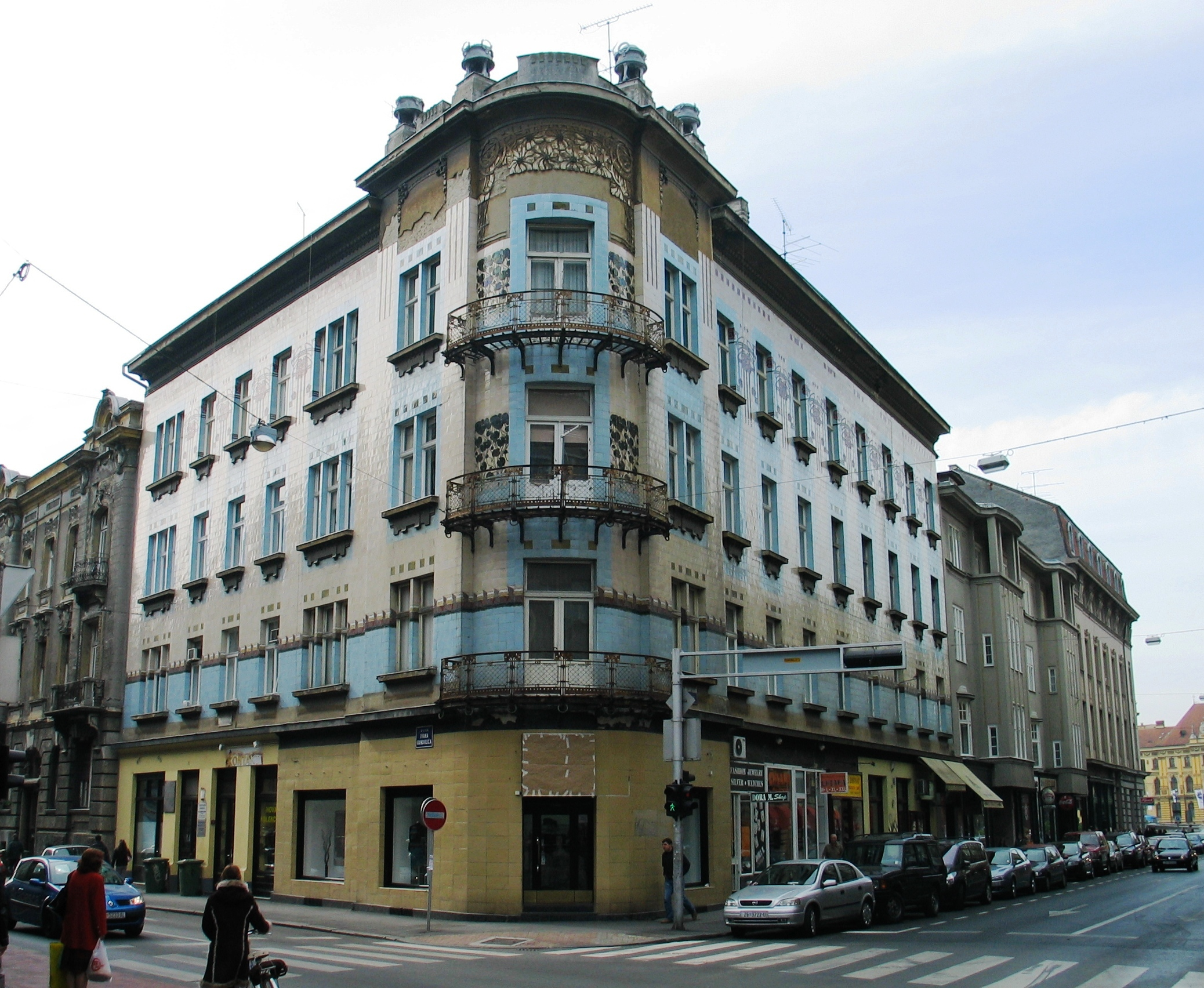 Vjekoslav Bastl- Kuća Kallina 1903-4. Masarykova 21-23 - Gundulićeva 23 Zagreb